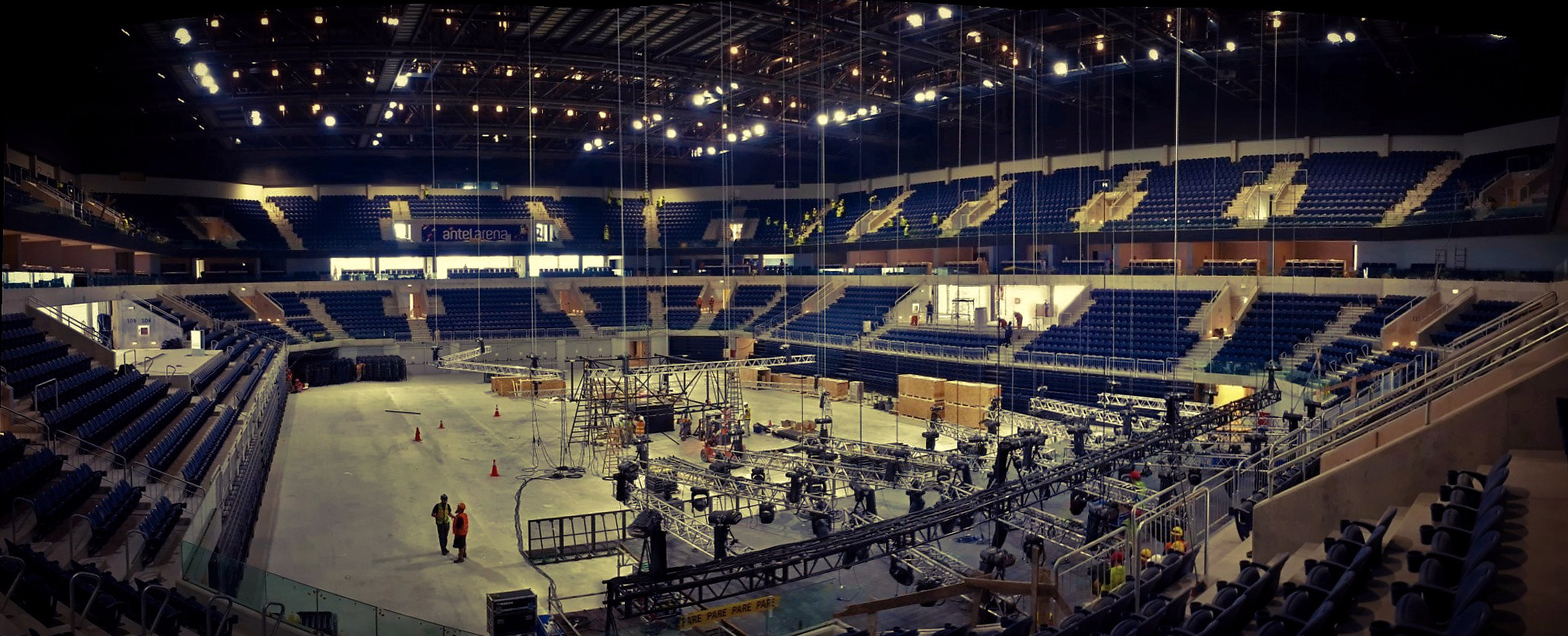 Estadio polifuncional Antel Arena. Arquitectos Pablo Bacchetta, José Flores, Rodrigo Carámbula. Ubicación avenida José Pedro Varela y avenida Dámaso Antonio Larrañaga, Montevideo, Uruguay.